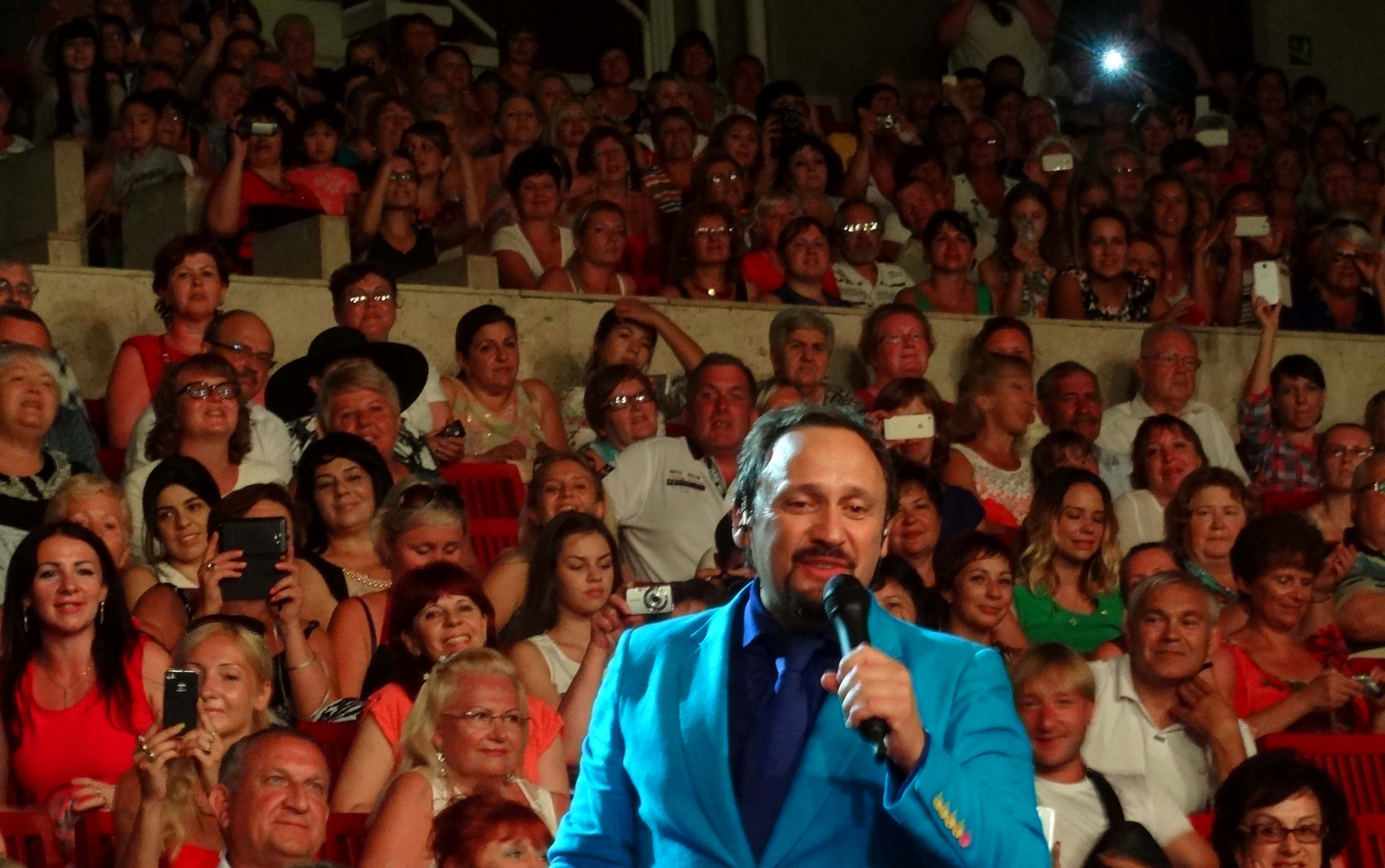 Стас Михайлов - российский эстрадный певец, автор песен, заслуженный артист Российской Федерации. Сочи, концертный зал "Фестивальный", 2014 год.